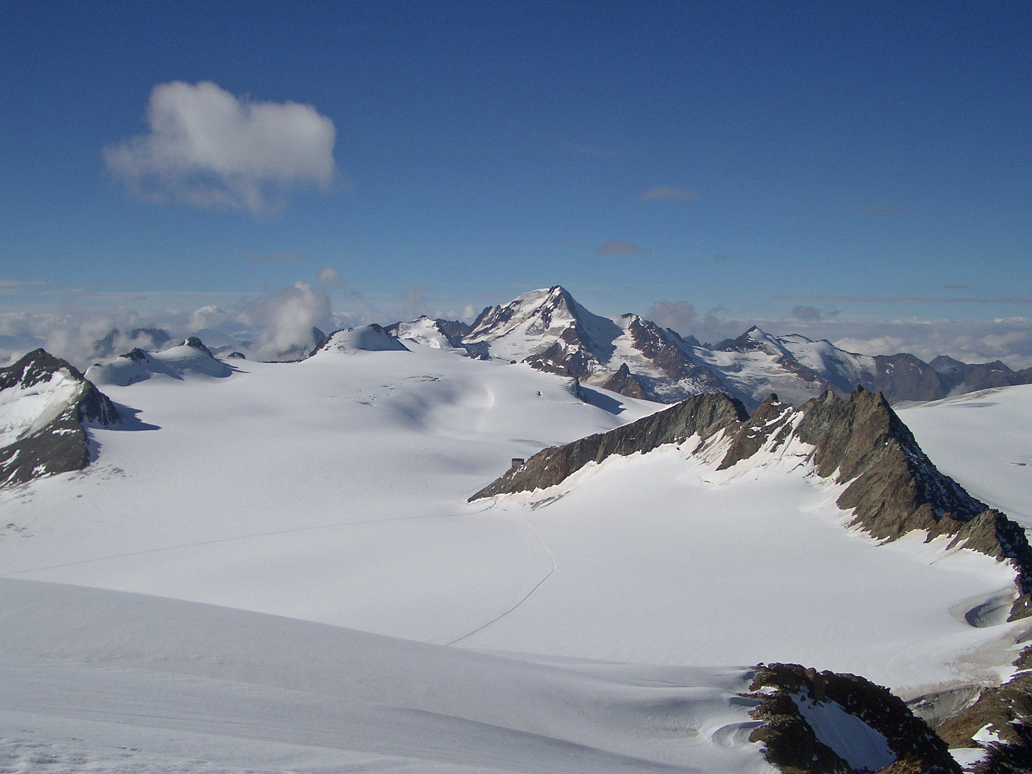 Gepatsch- und Kesselwandferner vom Fluchtkogel. Brandenburger Haus oberhalb des Kesselwandjochs. Im Hintergrund die Weißkugel.